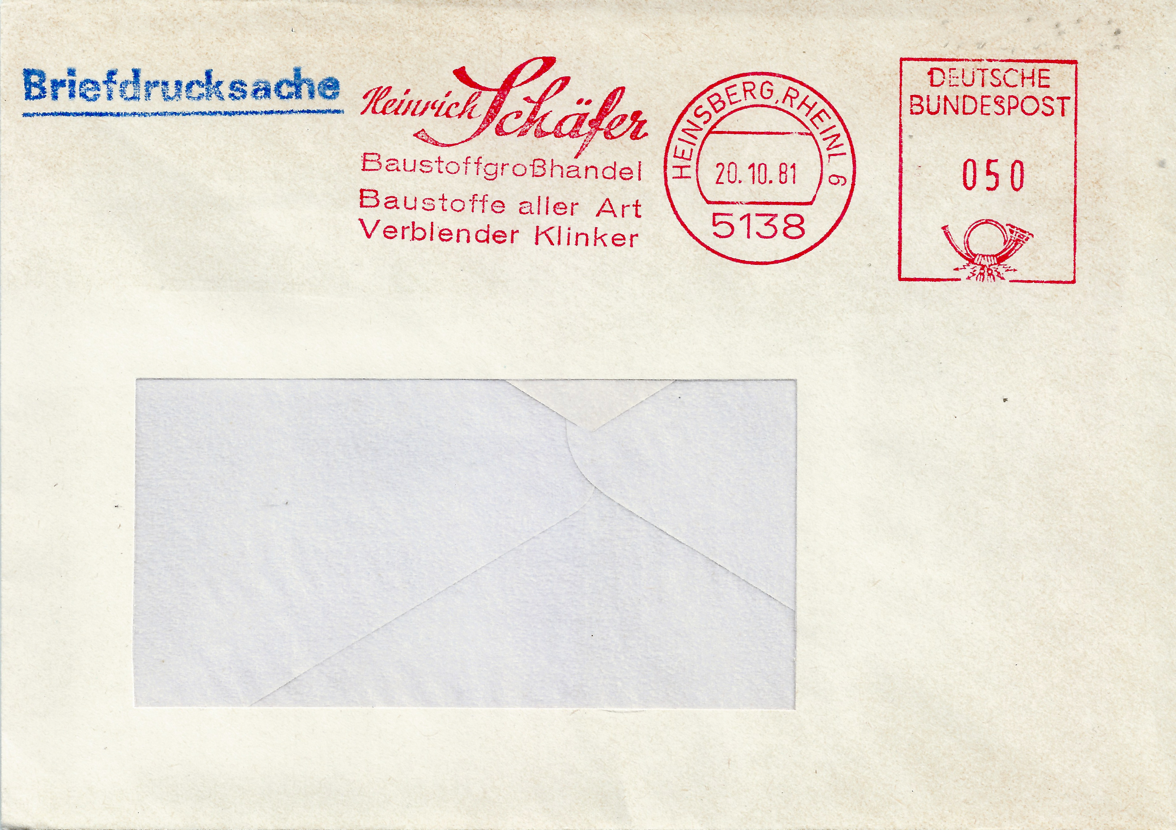 Briefsendung, Fensterbriefumschlag, Versand mit der Deutschen Bundespost als Briefdrucksache, frankiert 0,50 DM mittels Freistempel